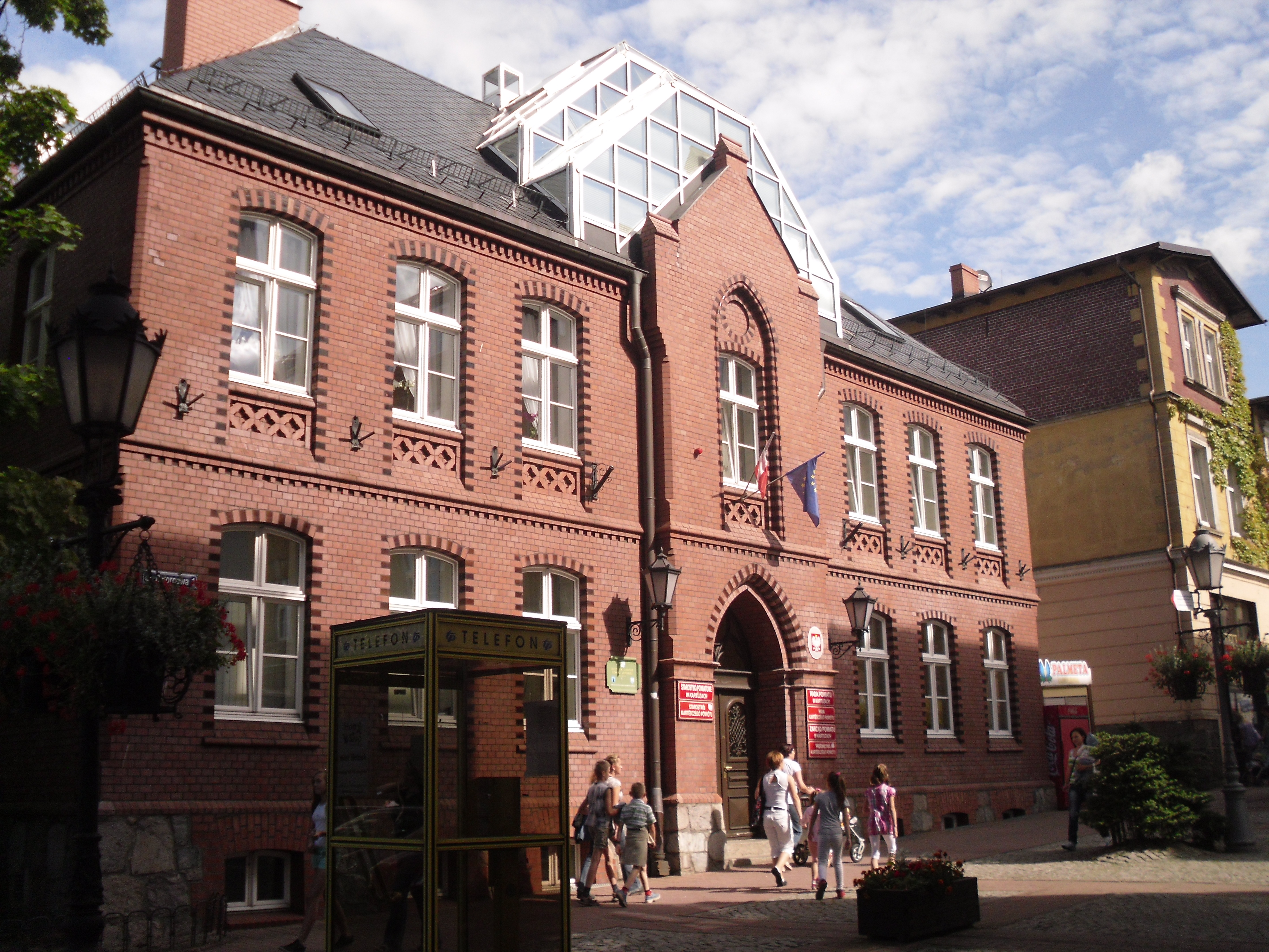 Kartuzy, ul. Dworowa 1 - kamienica, przejściowo Państwowa Szkoła Muzyczna, obecnie Starostwo Powiatowe, pocz. XX